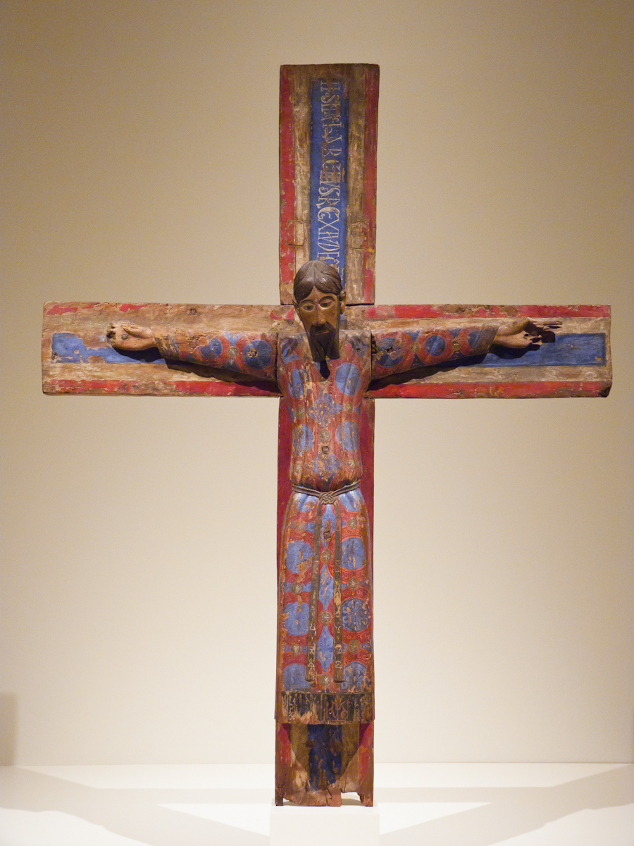 Barcelona Romanico 934 05 de julio de 2011